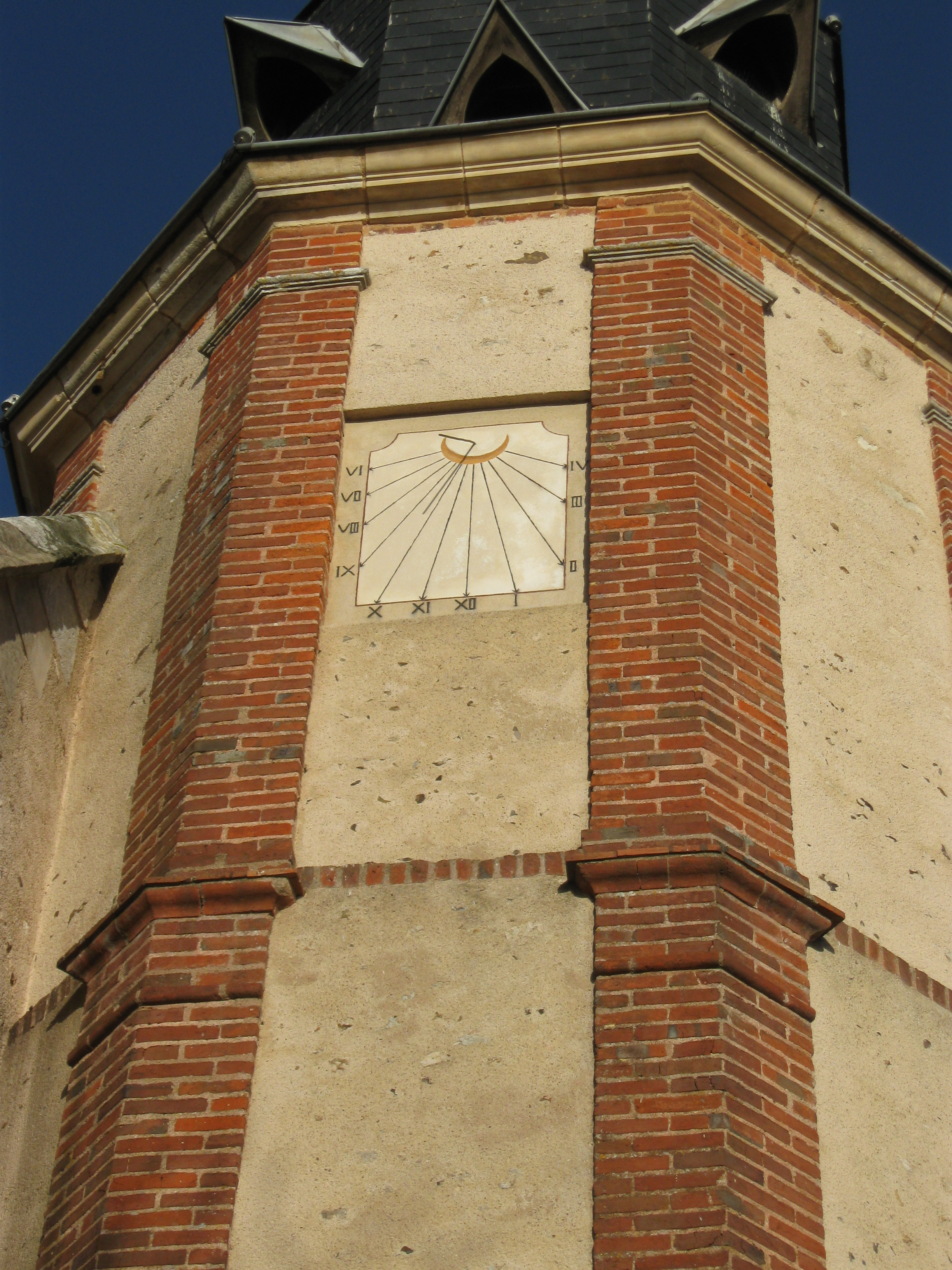 Eglise de Saint-Mamès à Donnemain